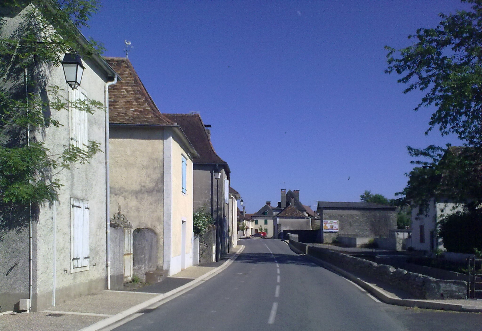 Méritein le 18 juillet 2010, France.